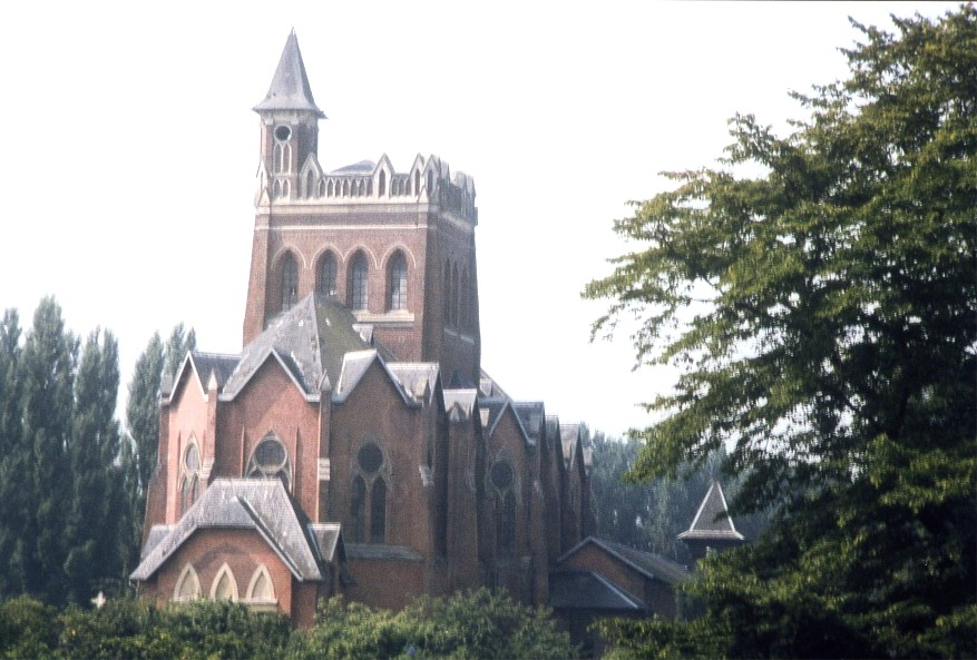 l'église de Montescourt prise depuis la rue du cimetière